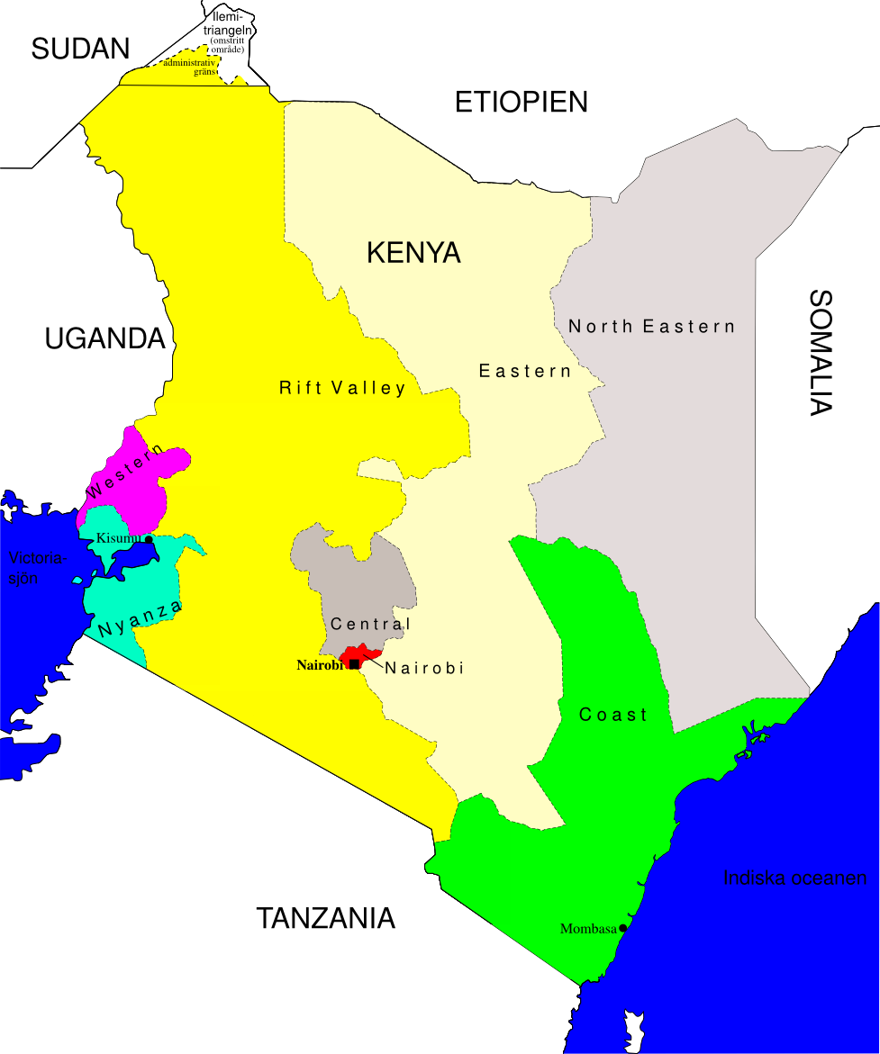 Kenyas provinser och största städer, 2009.